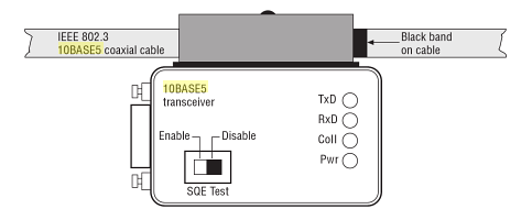 10base5 transiver